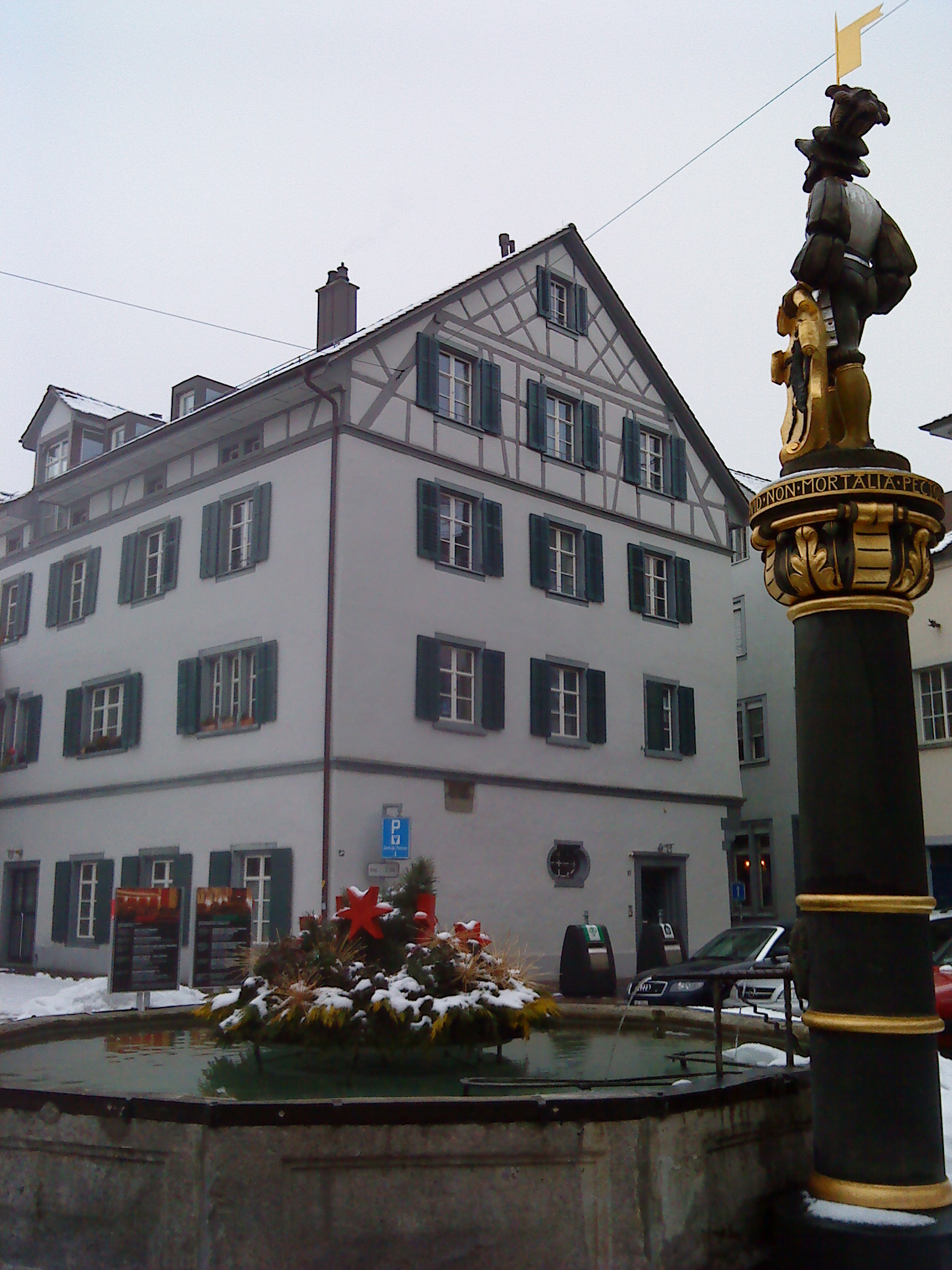 Das Konventgebäude des ehemaligen Barfüsserklosters am Platz in Schafhausen.